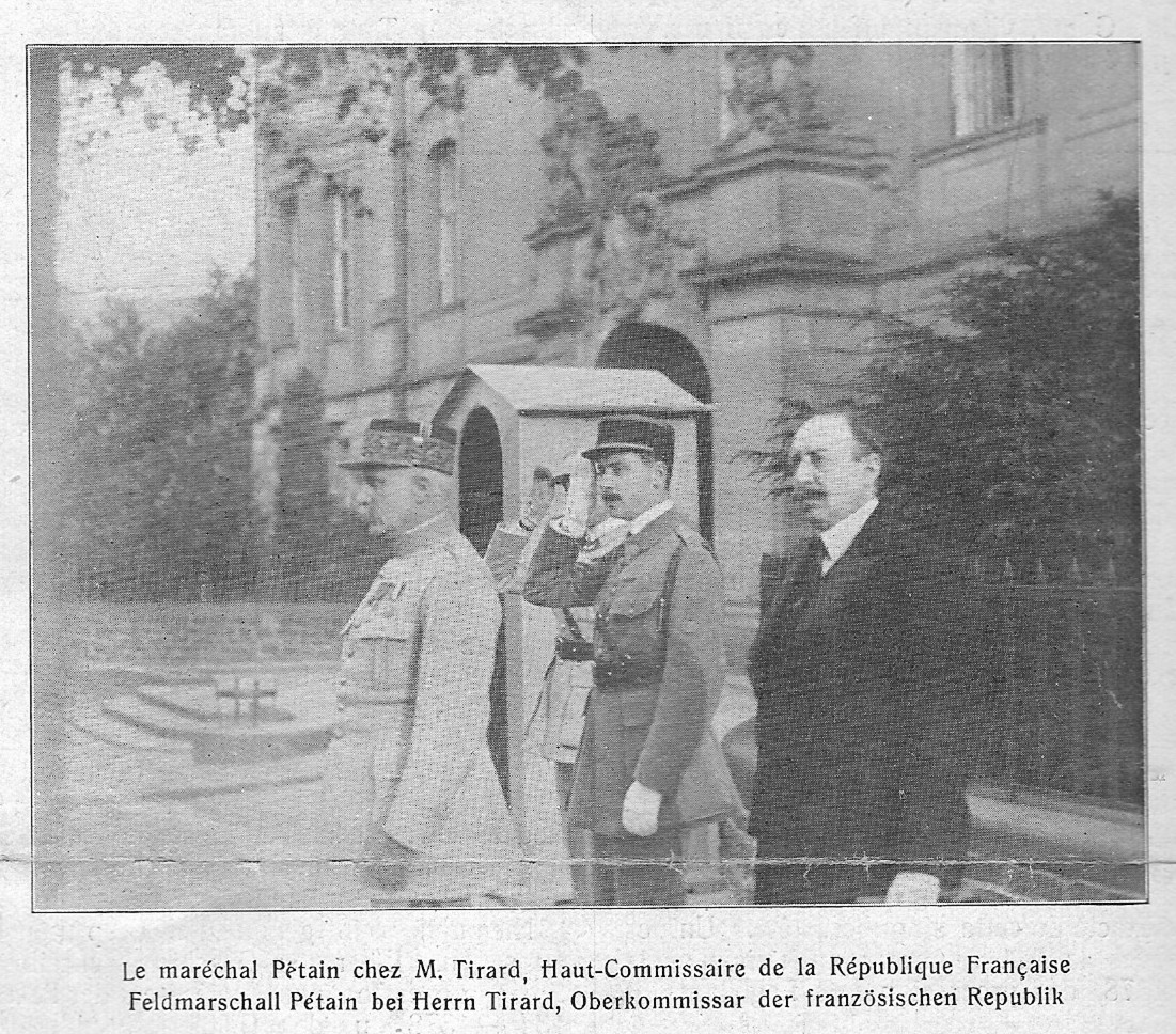 Extrait du Rhin Illustré n¨56 du Samedi 20 mai 1920; Le Maréchal Pétain en visite à la Garnison de Mayence